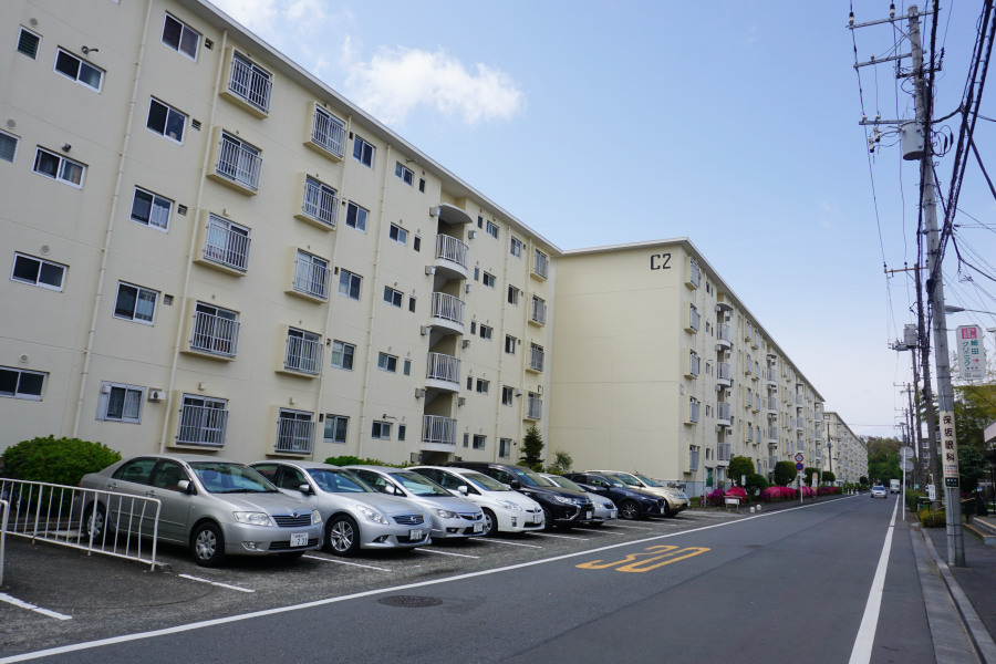 新原町田グリーンハイツ（神奈川県相模原市南区鵜野森1丁目）